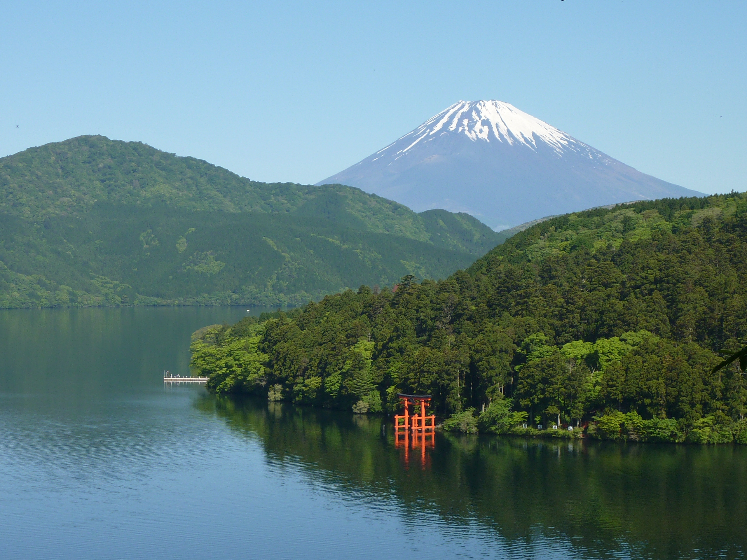 箱根芦ノ湖成川美術館付近から見た富士山と芦ノ湖（神奈川県箱根町）